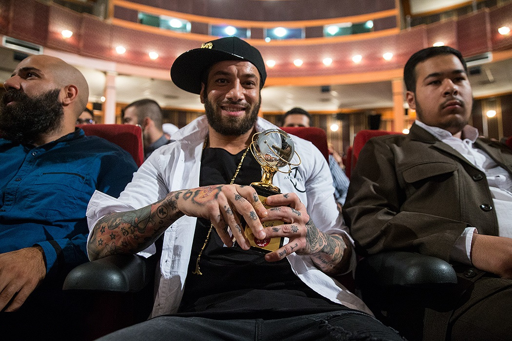 امیر تتلو در جشن اولین سالگرد «فارس پلاس» در حوزه هنری سازمان تبلیغات اسلامی